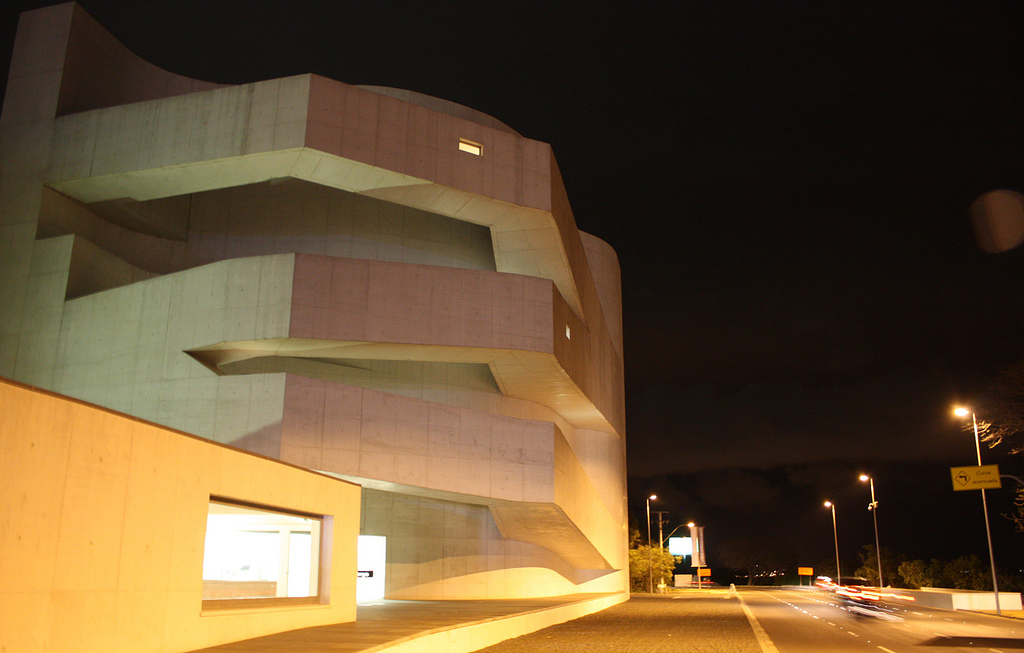 Fachada da Fundação Iberê Camargo à noite. A Fundação Iberê Camargo foi criada em 1995 pela viúva do pintor gaúcho Iberê Camargo (1914-1994), Maria Coussirat Camargo, para quem ele deixou seu acervo. O objetivo da instituição é conservar, catalogar e promover a sua obra. Localizada no bairro Cristal, às margens do lago Guaíba, a nova sede foi inaugurada no dia 30 de maio de 2008.